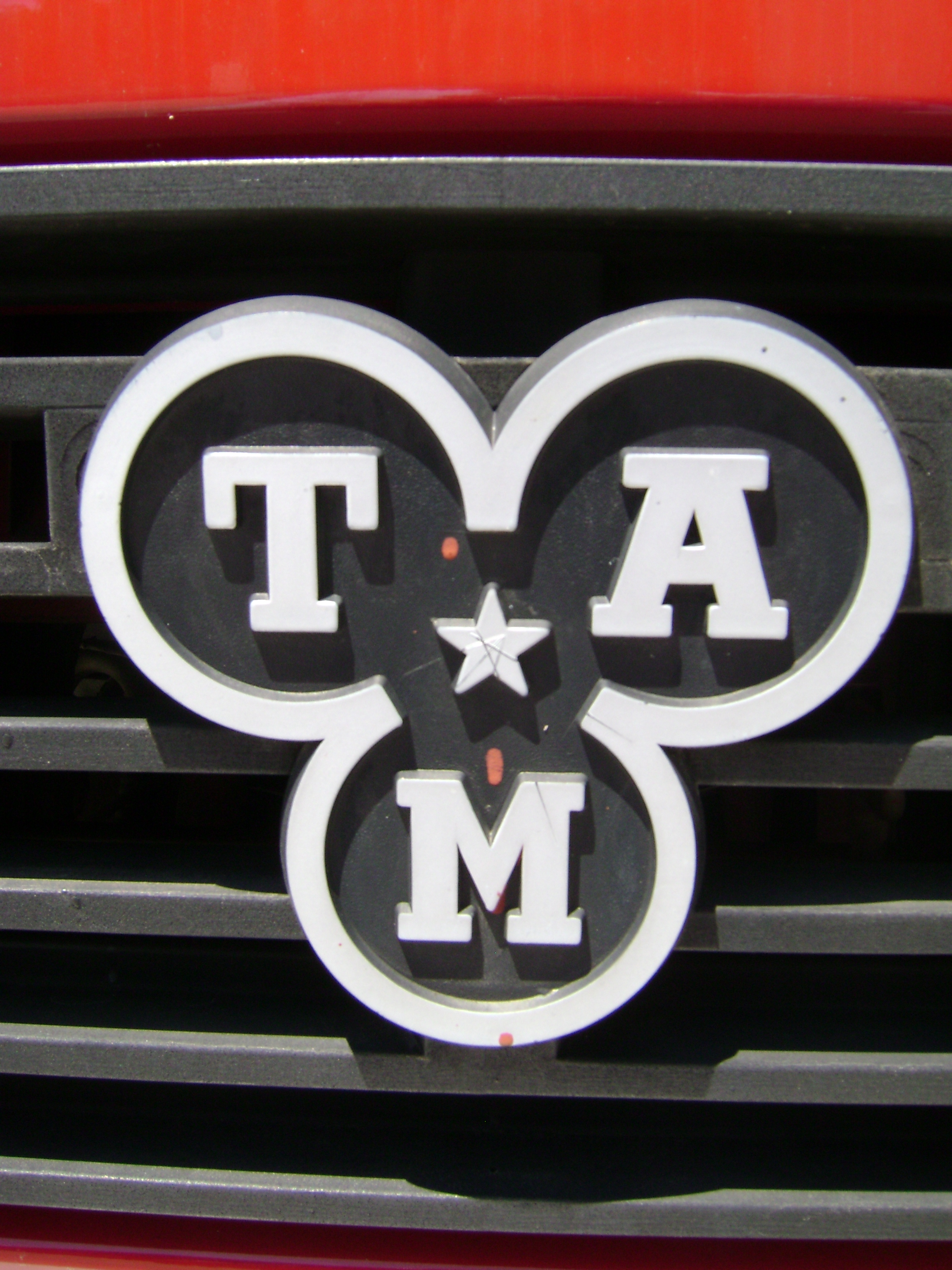 Logo tvornice TAM